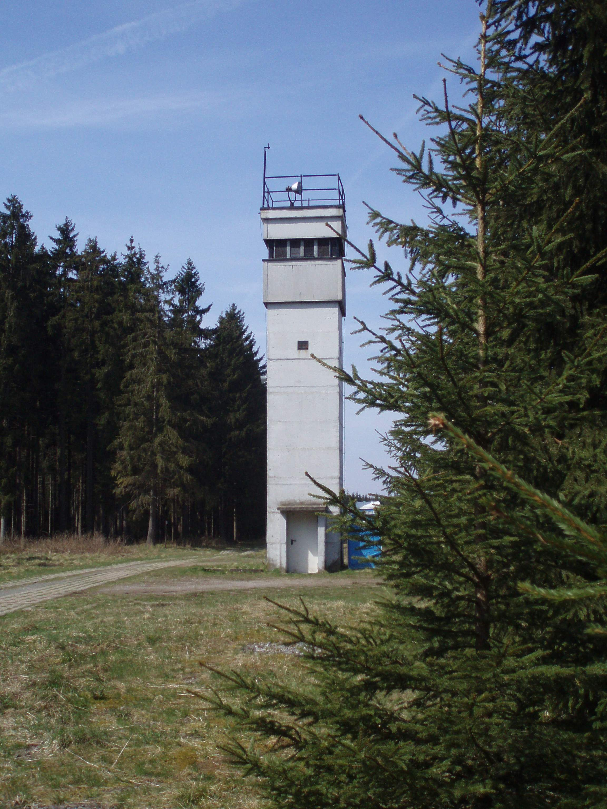 B-Turm Sorge